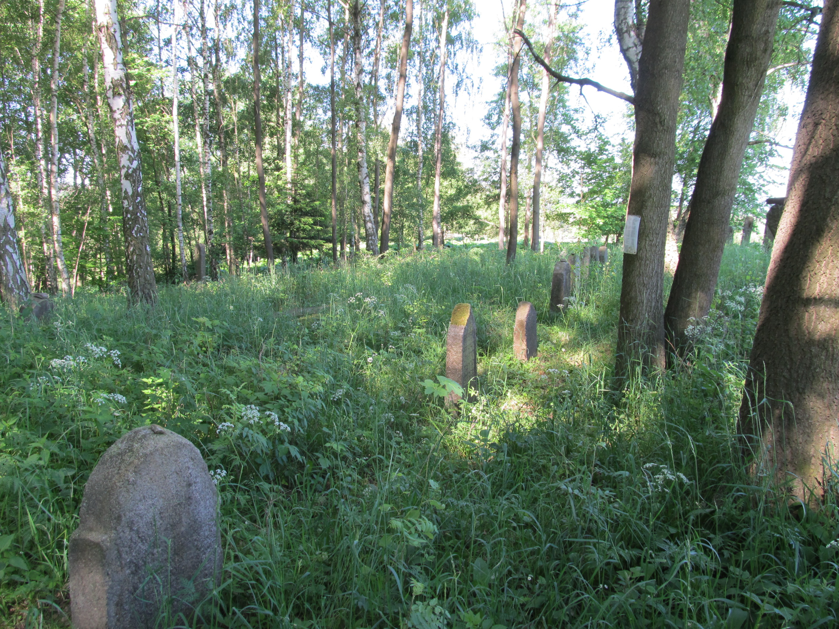 Židovský hřbitov Arnoltov